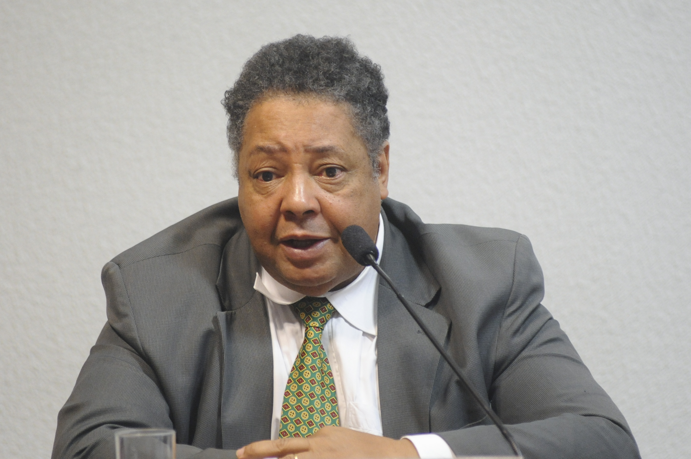 A Comissão de Direitos Humanos e Legislação Participativa (CDH) realiza audiência pública interativa para debater impactos das medidas econômicas sobre a população negra. Em pronunciamento,professor da Universidade de Brasília (UnB), Ivair Augusto Alves dos Santos. Foto: Pedro França/Agência Senado